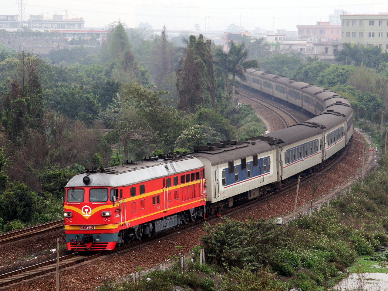 东风4B型柴油机车牵引三茂铁路股份有限公司客车穿行于广州市郊。